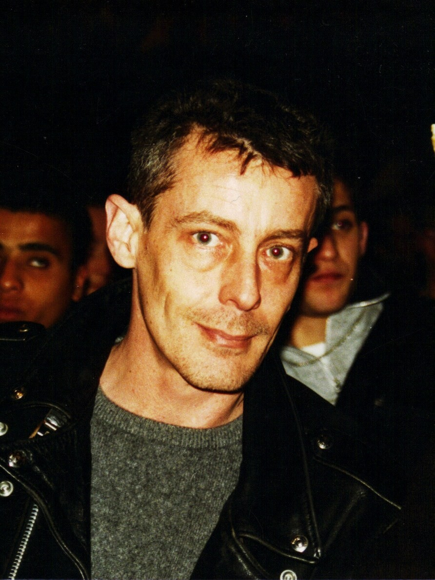 Michele Soavi au festival de Gérardmer